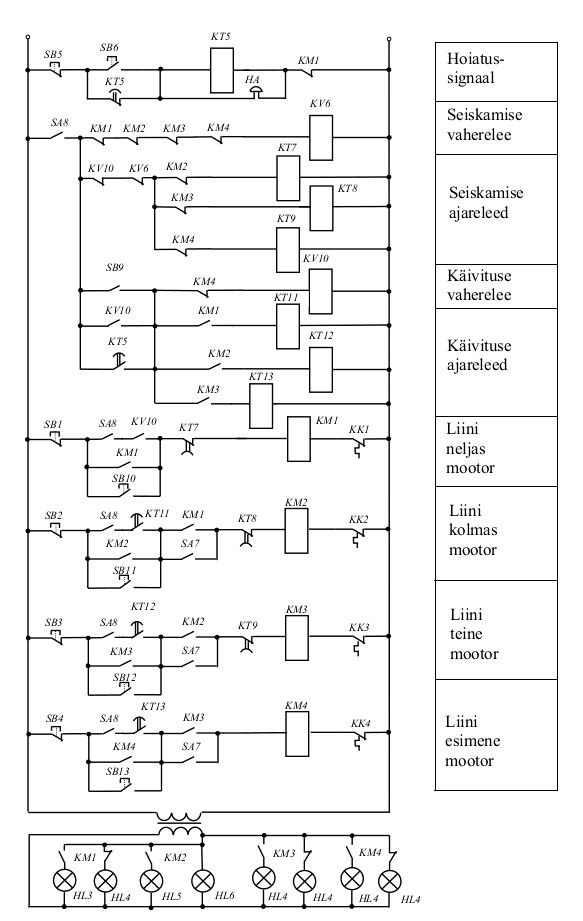 Vooluliini põhimõtteskeem